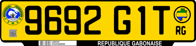 Схематичне зображення номерного знаку